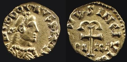 Tiers de sou de Paris aux noms de Clovis II et saint Eloi. BNF, monnaies, médailles et antiques. Avers : Buste drapé et diadémé à droite. Revers : Croix latine ancrée, accostée de EL ICI.